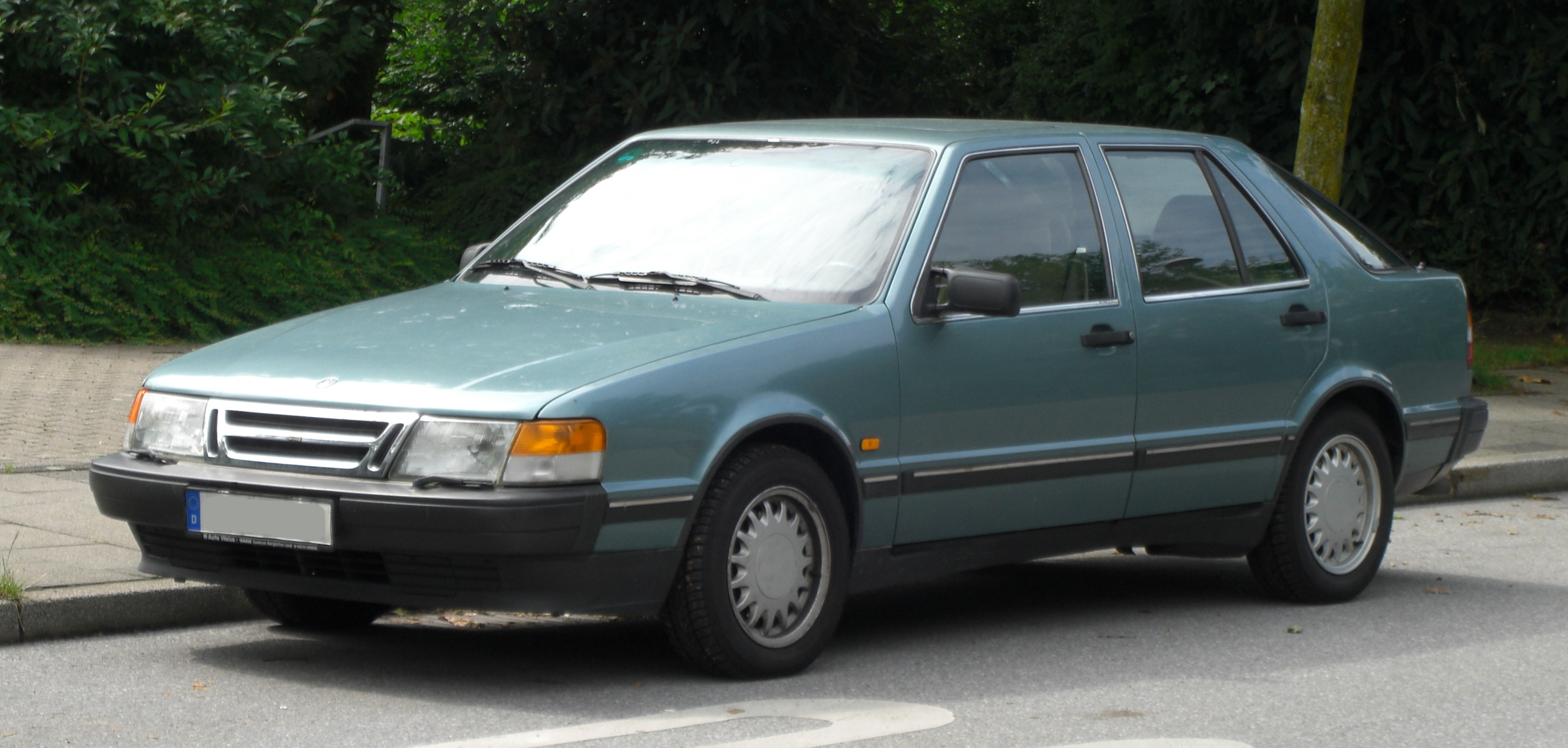 1991-1993 Saab 9000 CC